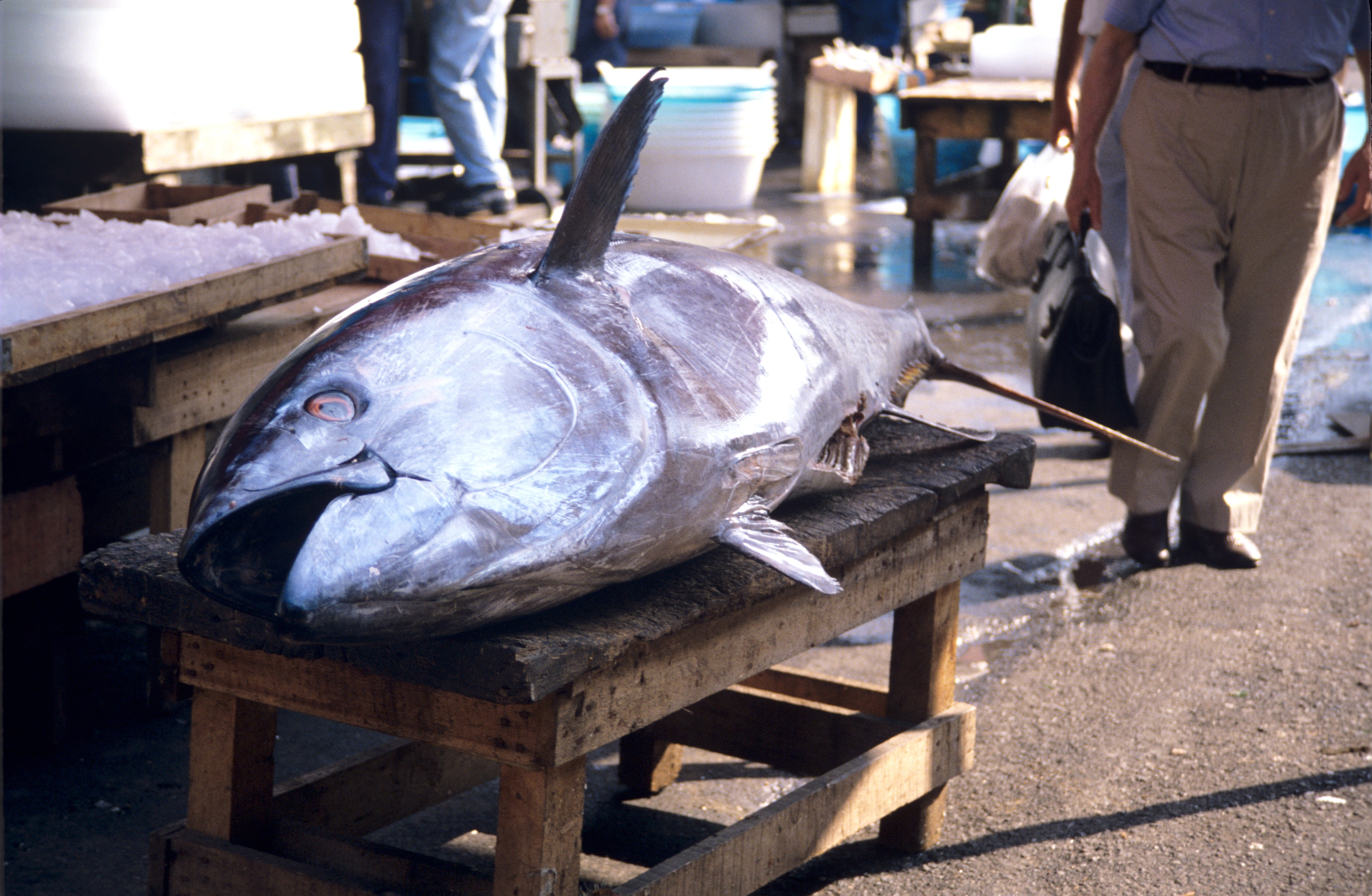 Au marché aux poissons de Catane, la Piscaria, sur une table en bois, un thon rouge de taille importante en attente d' être découpé. Catania, Sicile, Italie.